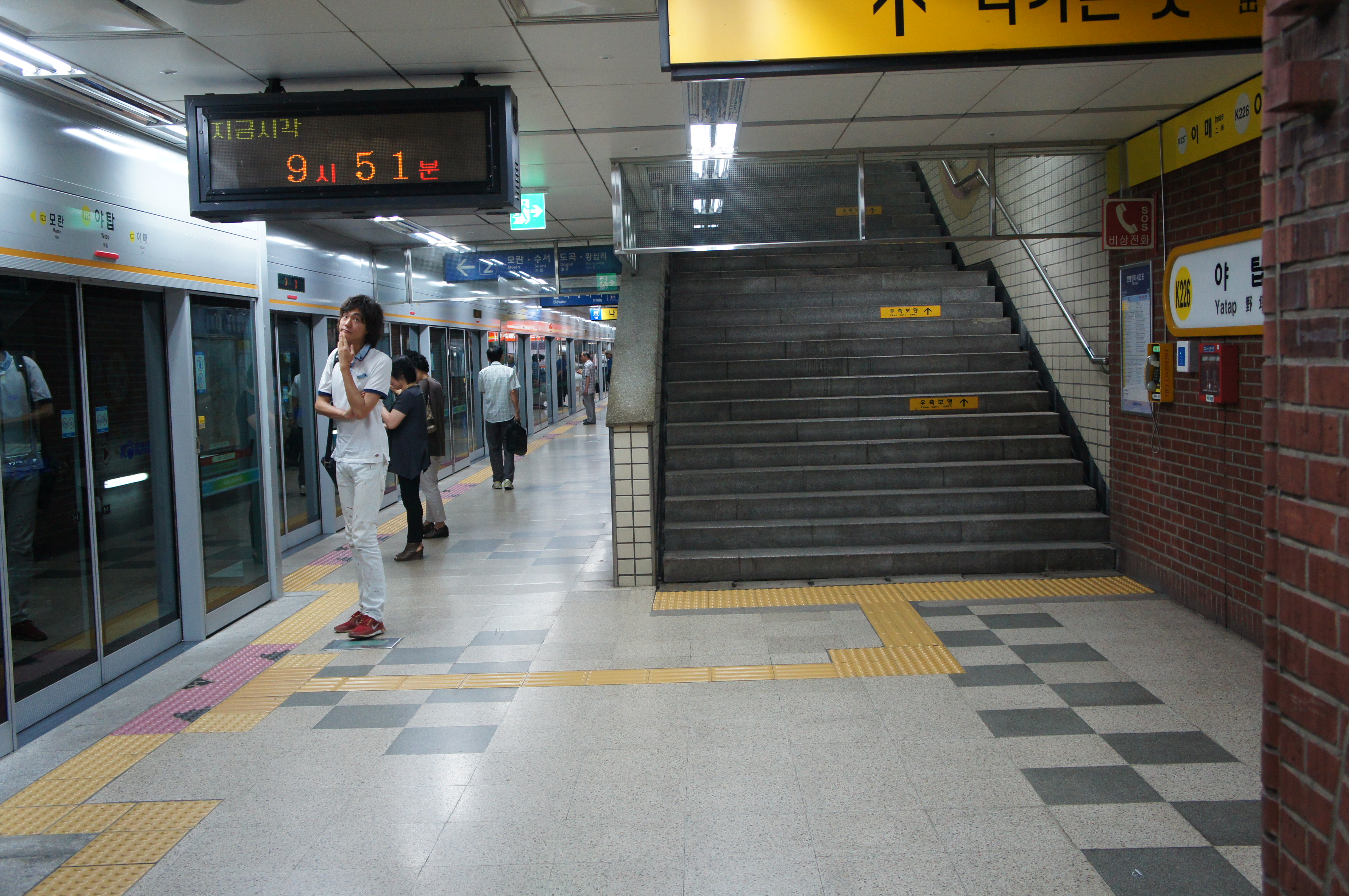 야탑역 승강장